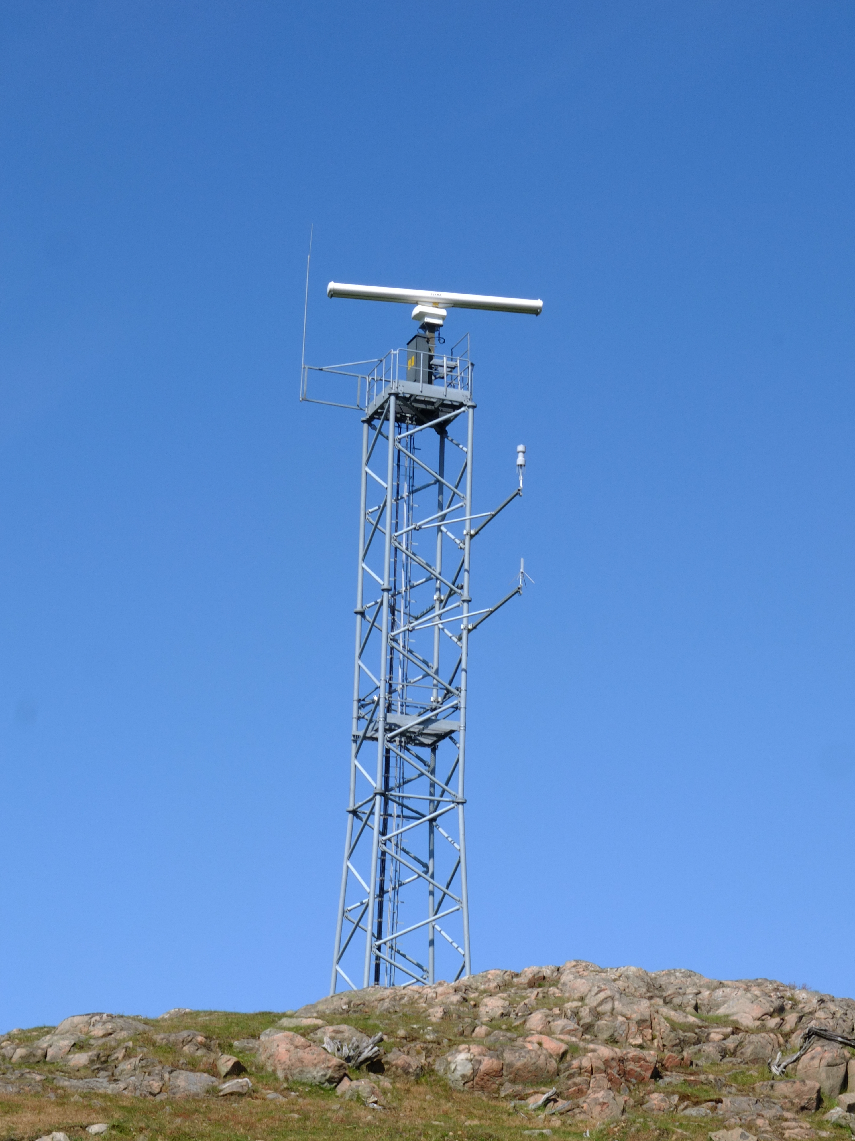 Kustspaningsradar PS-640 på Kullaberg